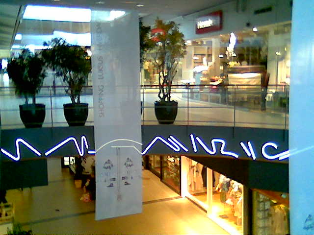 Hørsholm Midtpunkt Shopping Mall, Hørsholm (north of Copenhagen, Denmark)